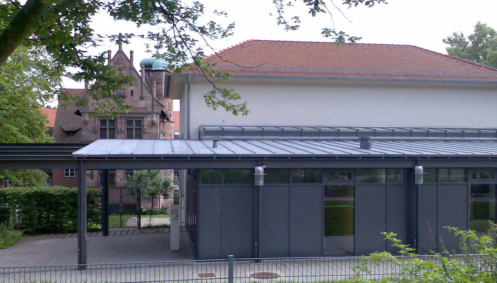 Rückseite des Hirsvogelsaals vor dem Tucherschloss in Nürnberg